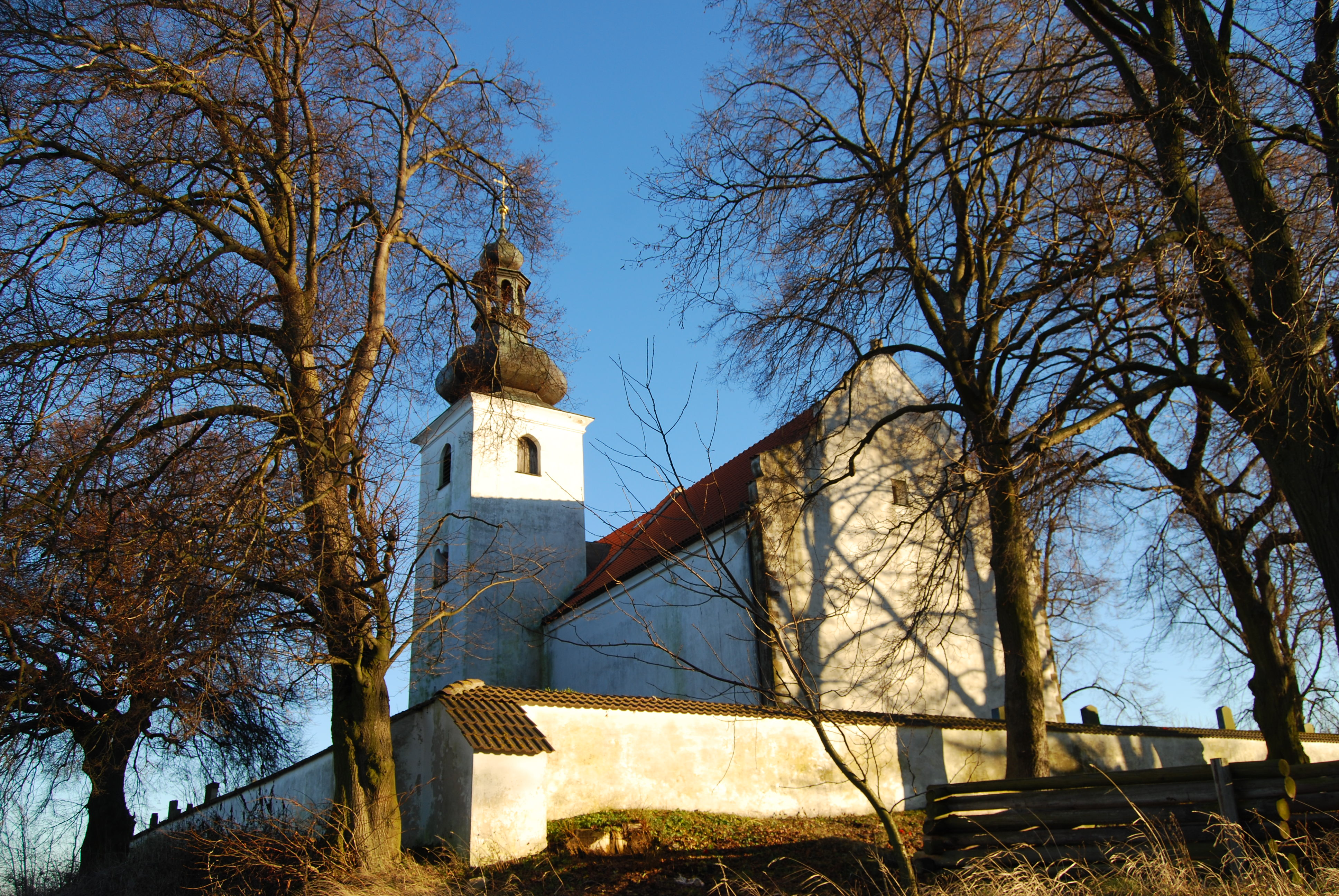 Kostel Narození Panny Marie se hřbitovem. Nový Kostelec - část městyse Borotín v okrese Tábor. Čská republika. - Google Maps - Google Earth